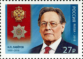 Полный кавалер ордена «За заслуги перед Отечеством». Н.П. Лавёров (1930–2016), геолог, педагог.